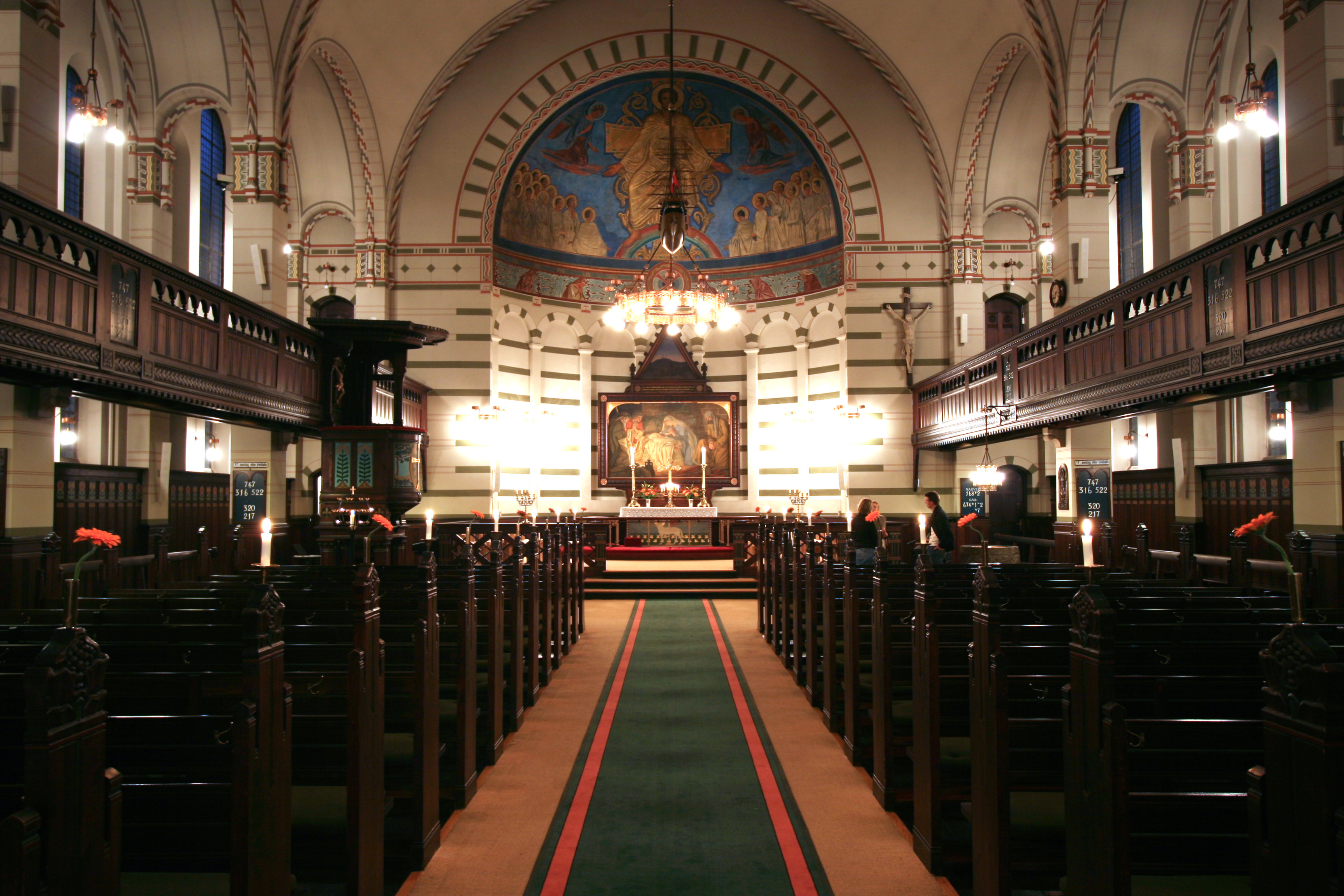 Kristkirken, Vesterbro, Copenhagen Denmark. Interior.